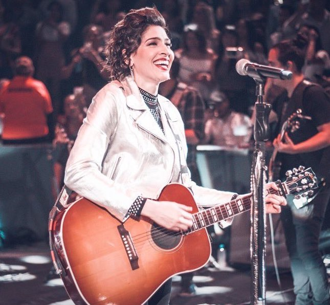 Ashley en concierto